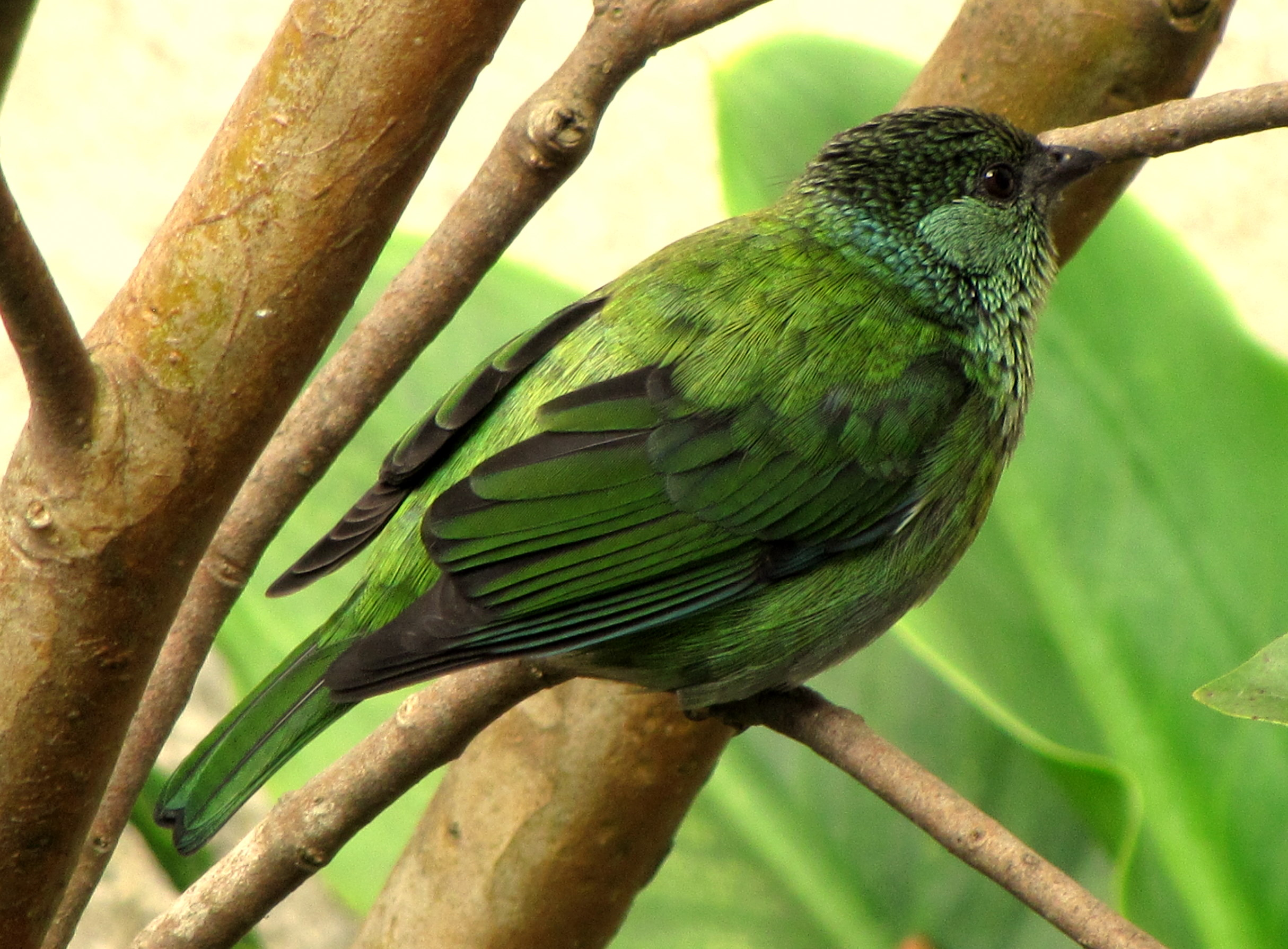 Tangara heinei (Tángara capirotada) - Hembra